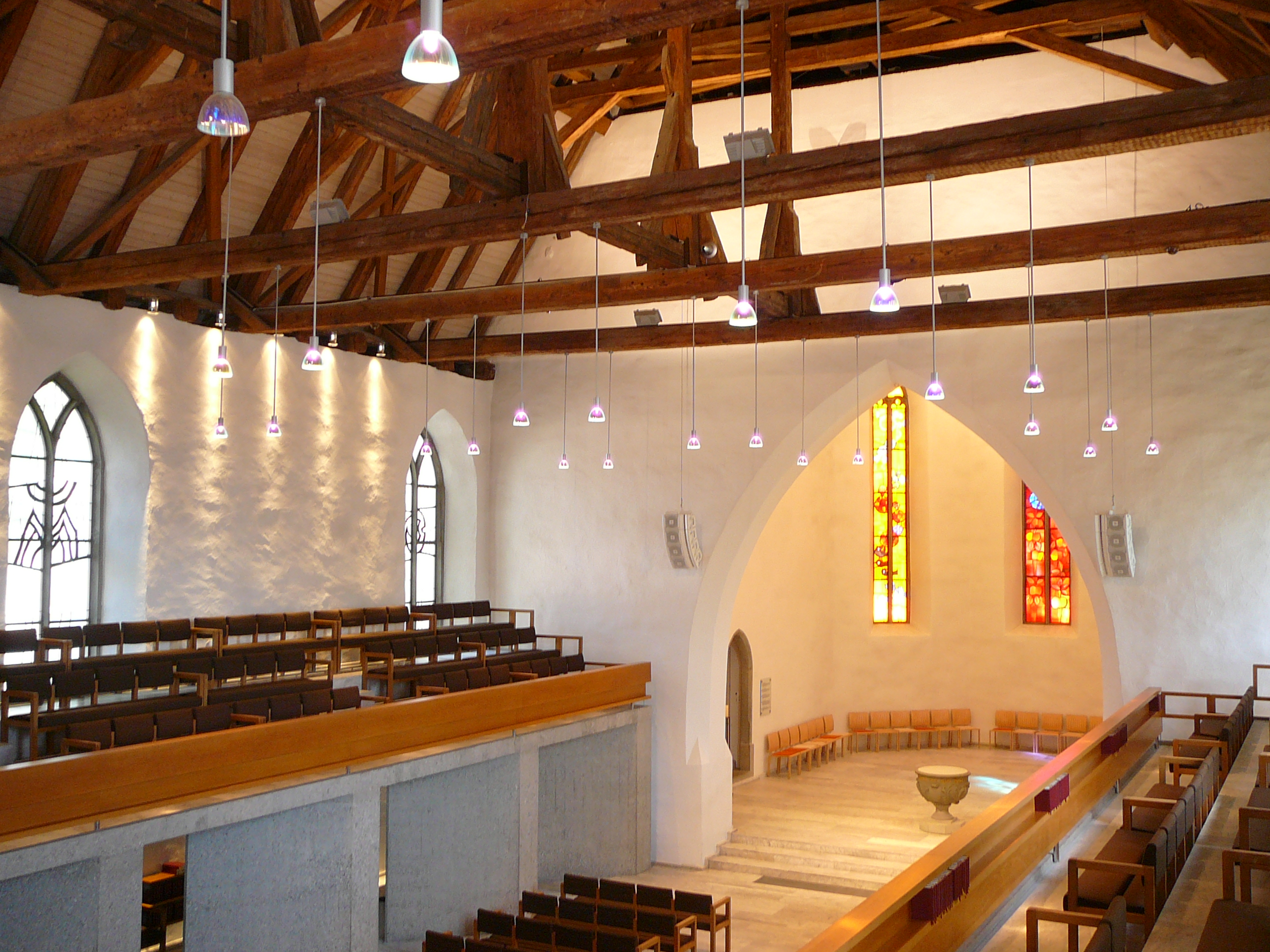 Reformierte Kirche Bülach, Längsschiff und Chor